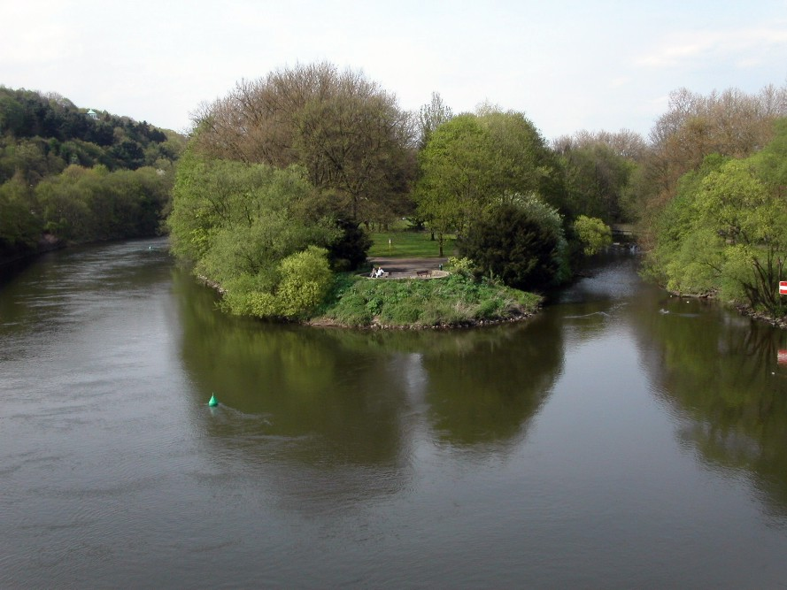 eigene Aufnahme, Mai 2006